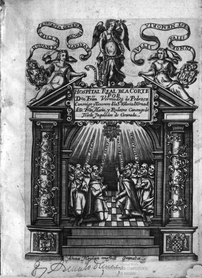 Portada calcográfica de Francisco Vermúdez de Pedraza, Hospital Real de la Corte, s.l. s.a.